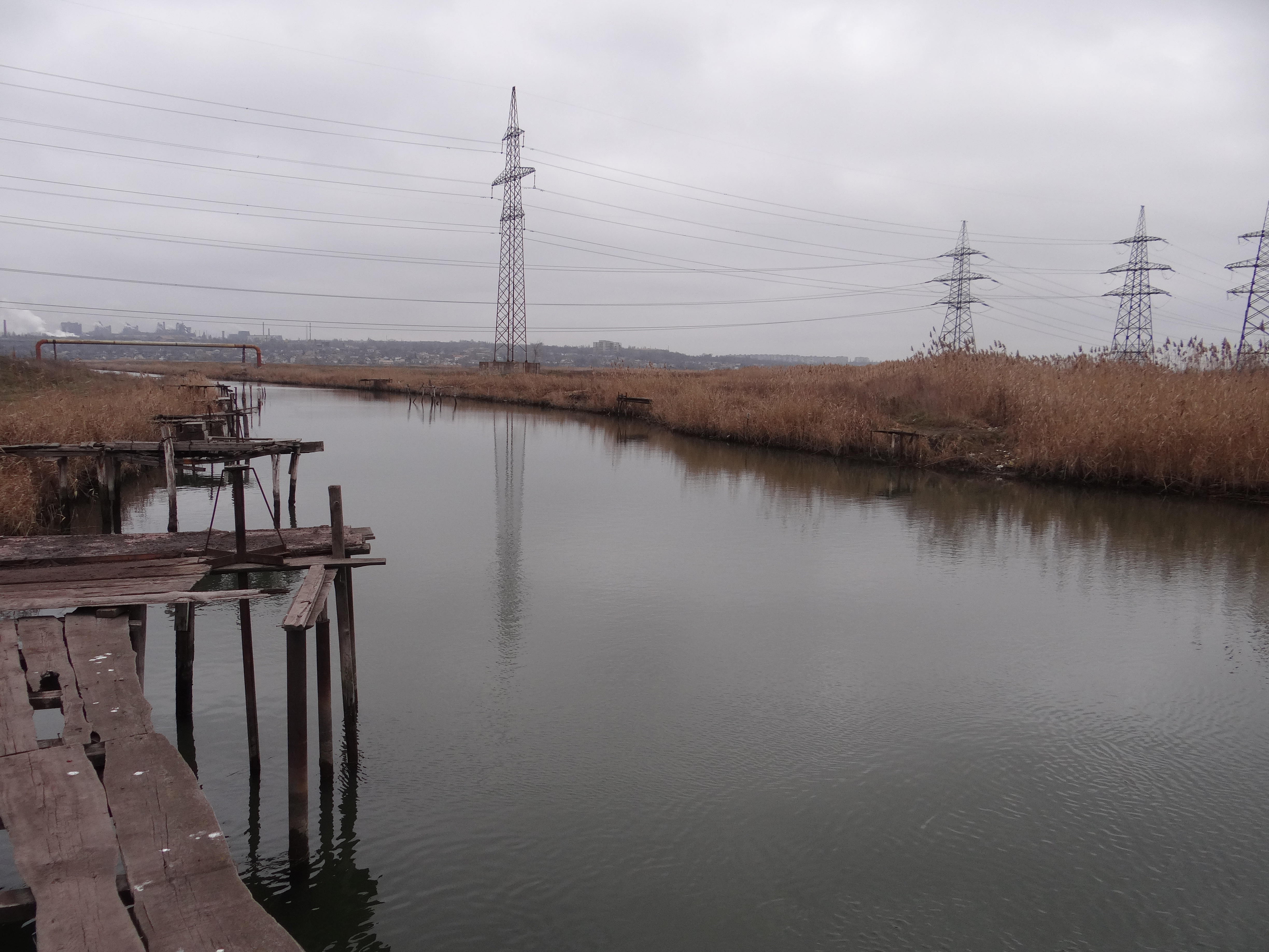 Кальчик у місці злиття з Кальміусом